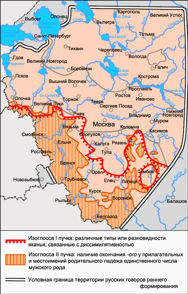 Карта южной диалектной зоны русского языка. Источники: Захарова К. Ф., Орлова В. Г. Диалектное членение русского языка — 2-е изд. — М.: Едиториал УРСС, 2004. — ISBN 5-354-00917-0, с. 95. Язык русской деревни. Диалектологический атлас. — Наречия и диалектные зоны. Бромлей С. В., Булатова Л. Н., Захарова К. Ф. и др. Русская диалектология / Под ред. Л. Л. Касаткина — 2-е изд., перераб. — М.: Просвещение, 1989. — ISBN 5-09-000870-1, с. 205